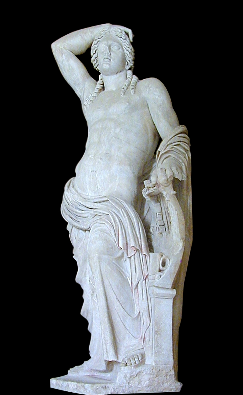 Apollon citharède au musée de Bardo (Tunisie), découvert à Bulla Regia